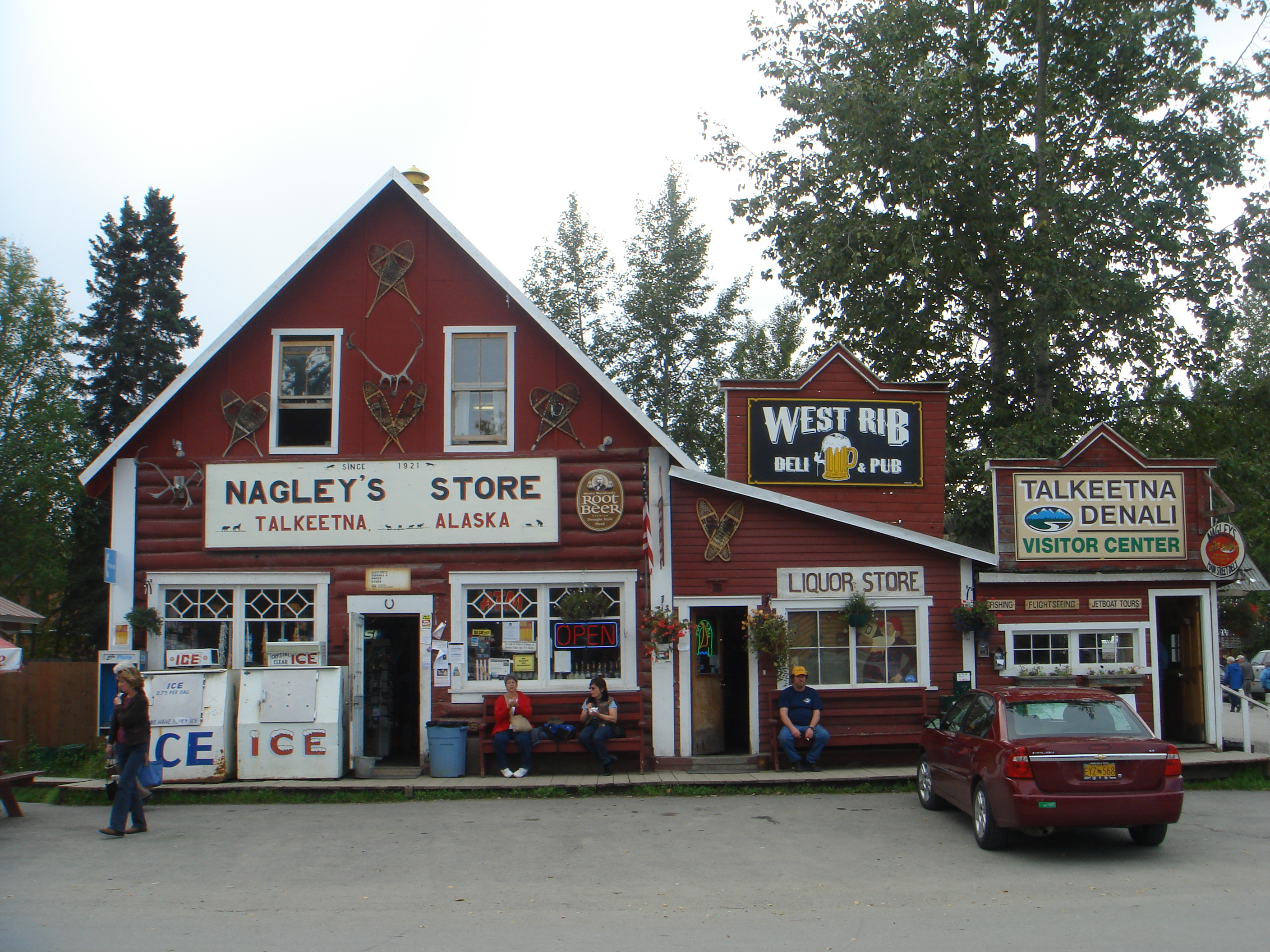 Talkeetna, Alaska